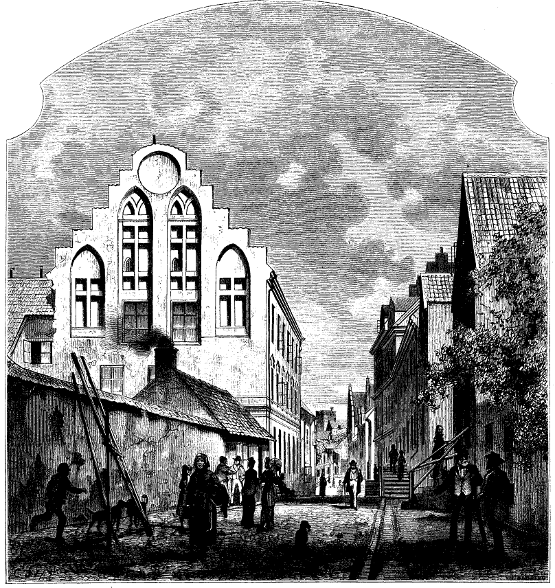 Parti av Strandgatan i Visby på 1870-talet